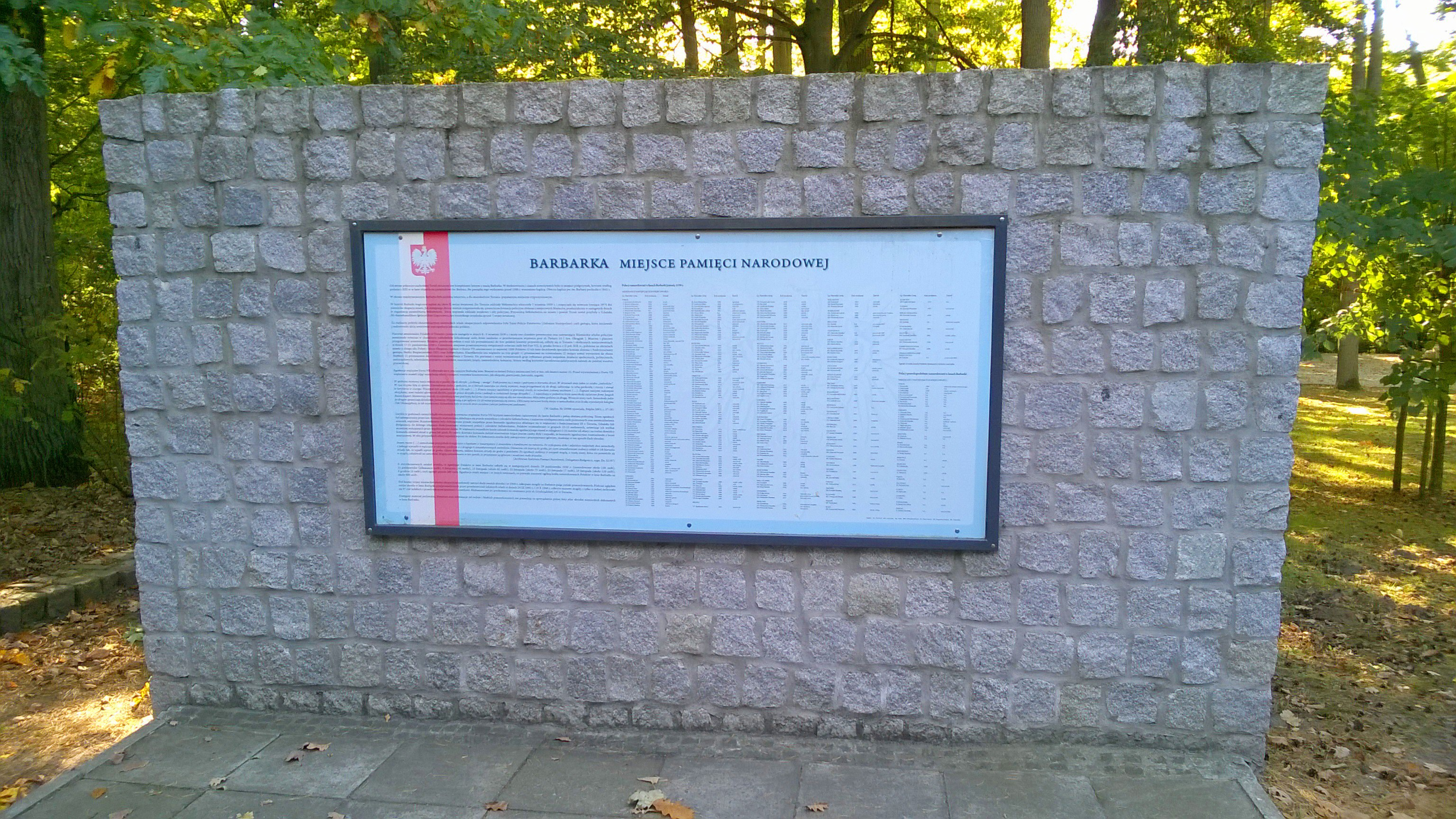 Cmentarza Ofiar Hitleryzmu w Toruniu5